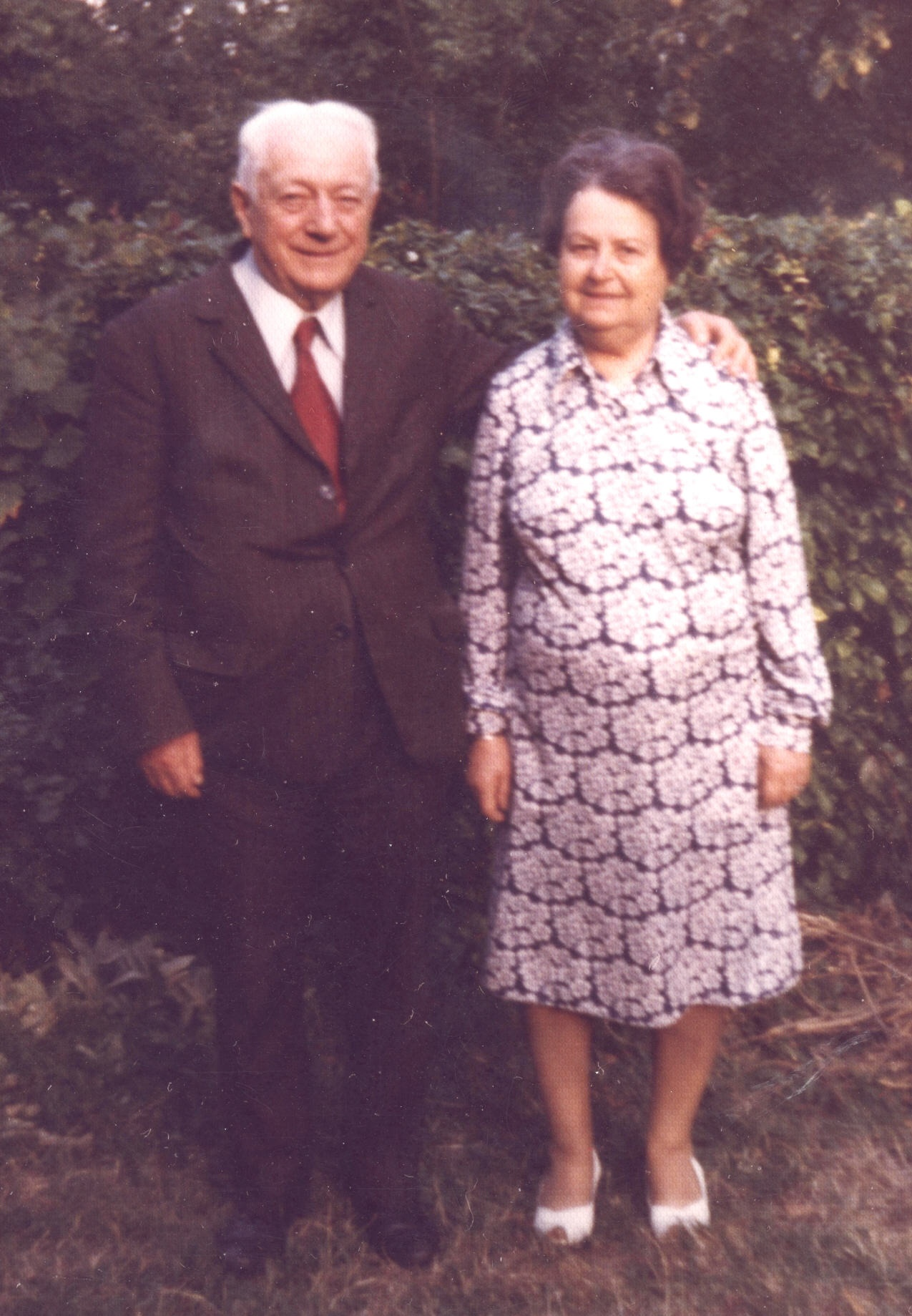 Romain Baron et sa femme (archives familiales).